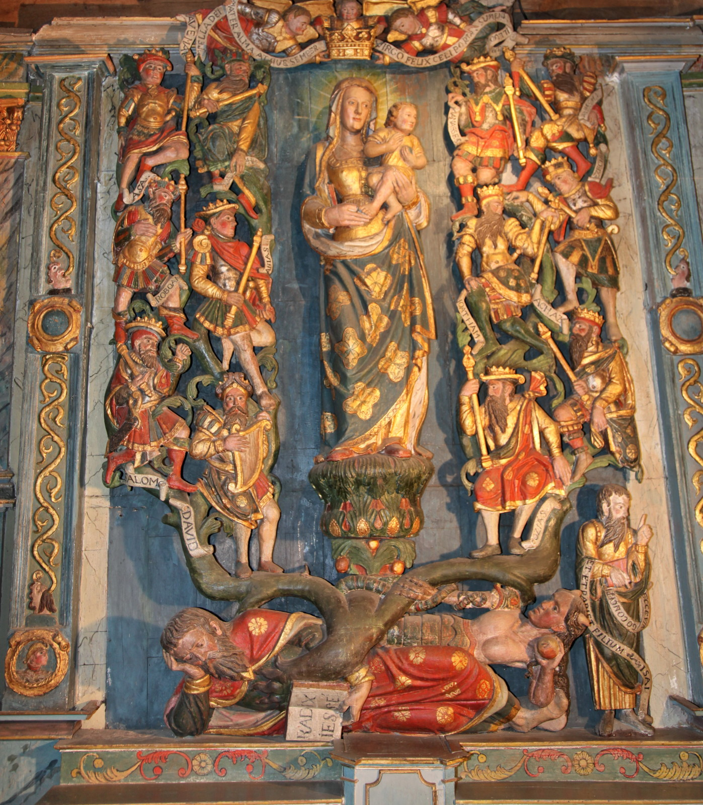 Arbre de Jessé (Église de Saint Aignan). Comme d'autres arbres de Jessé bretons, il présente, en face de Jessé, une démone à la queue couverte d'écailles.